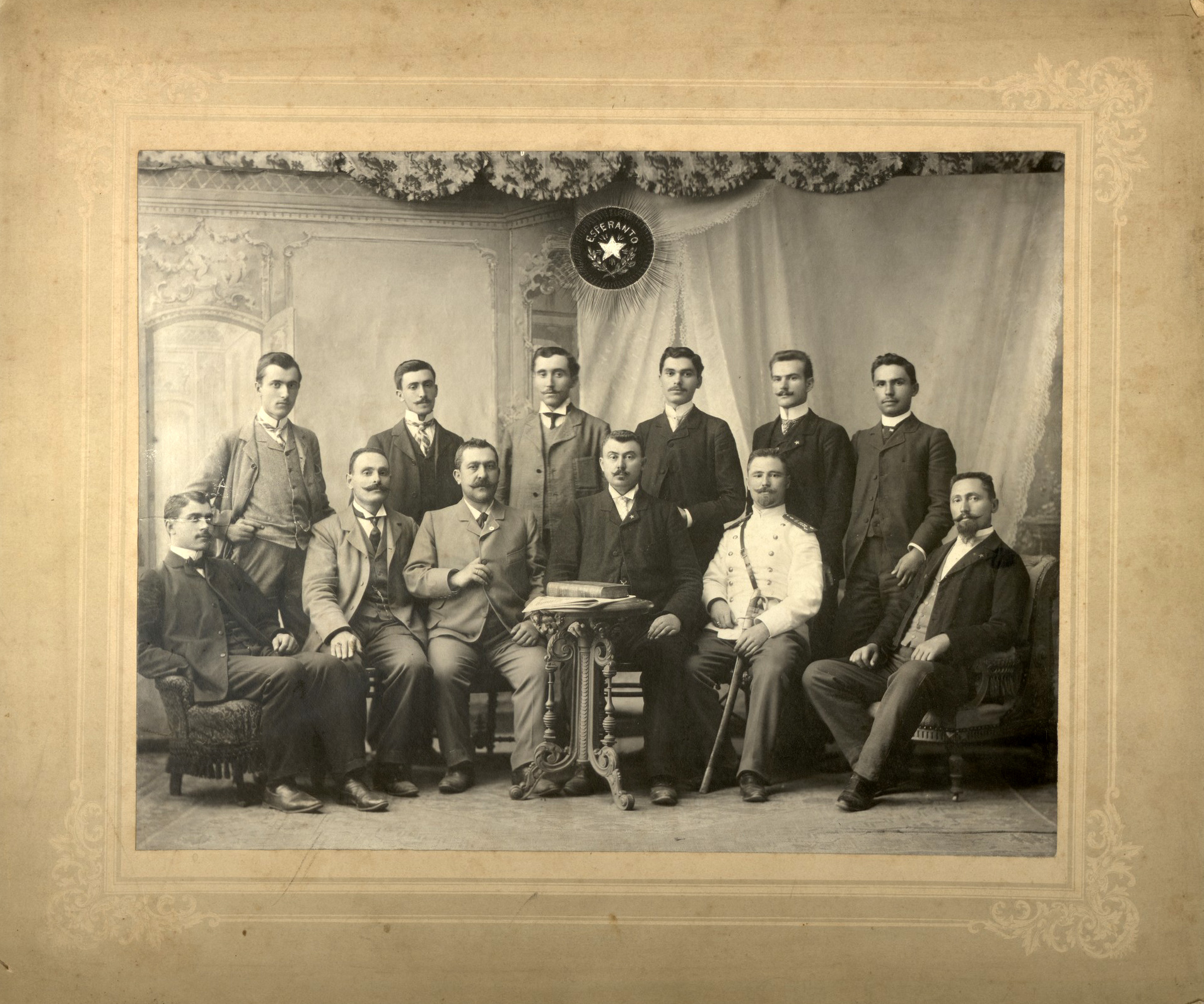 Estraro de la Esperanto-klubo Aŭroro en Sofio, Bulgario, 1902. De maldekstre, sidantaj: Petr Jordanov, Georgi Oreŝkov, Petr Popov, Nikola D. Kovaĉev, ?, Ĥristo Popov. Starantaj: Simeon N. Petkov, Petr Spasov, ?, ?, ?, Georgi Zografski (Gopozo)